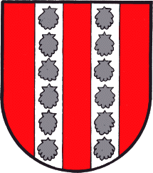 Wappen der Gemeinde Thal (Steiermark) in Österreich